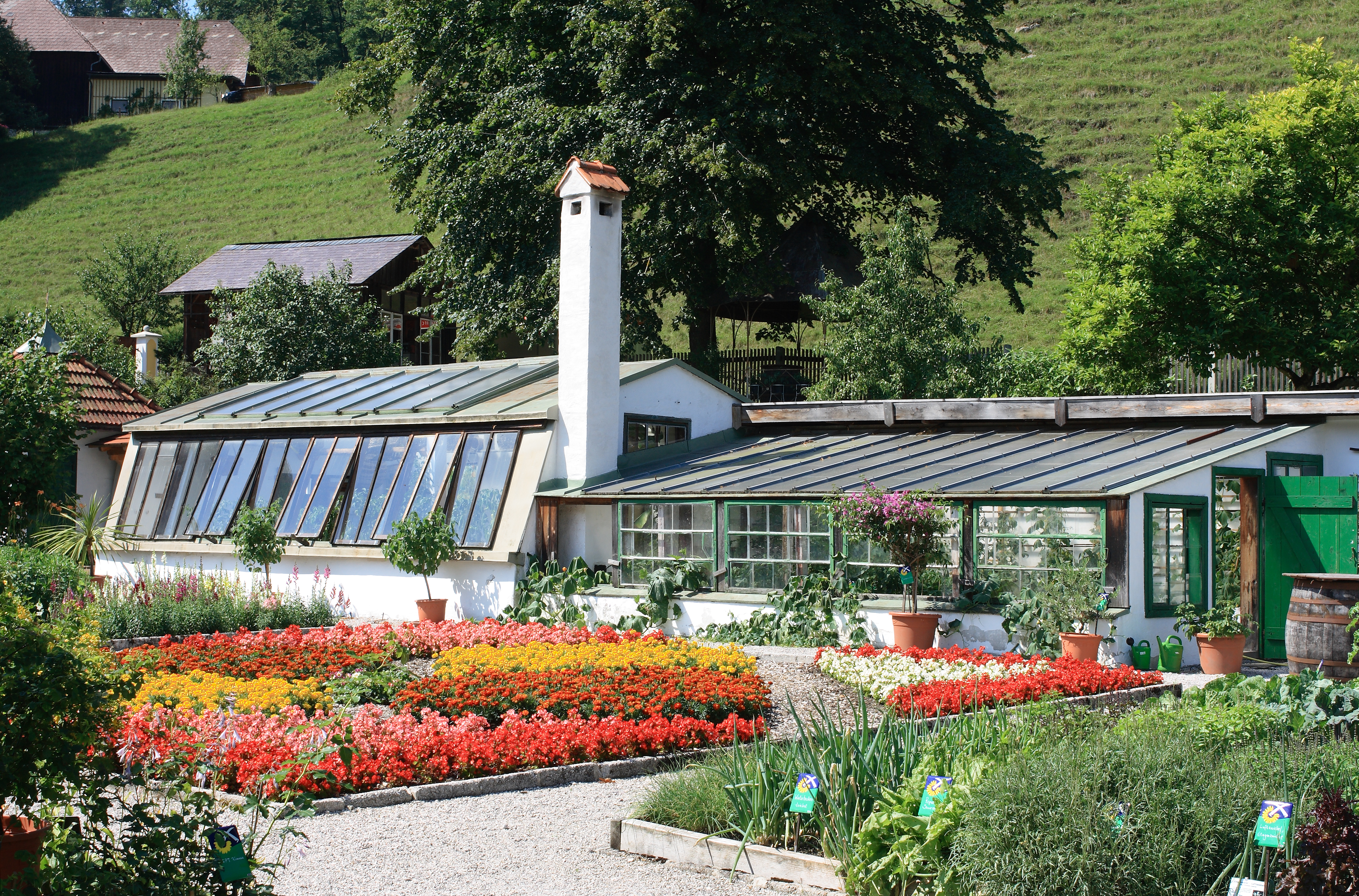 Glashaus im Herrschaftsgarten (Ensemble Schmiedleithen, Grünburg)